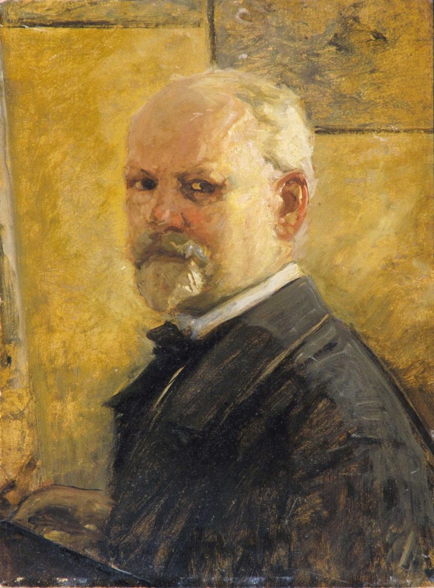 Brystbilde. Kropp hel venstre profil, hode 1/4 venstre profil. Sparsomt gråhvitt hår. Ansikt rødmusset med gulhvitt glanslys. Venstre øre rødfiolett. Grå mustasje og ditto fippskjegg. Øyne brune. Gråhvit snipp. Brunsvart sløyfe. Brun jakke med svarte skygger og grått glanslys. Høyre hånd skjematisk framstilt. Bakgrunn gulbrun, øverst en bred og en smal grå rute.